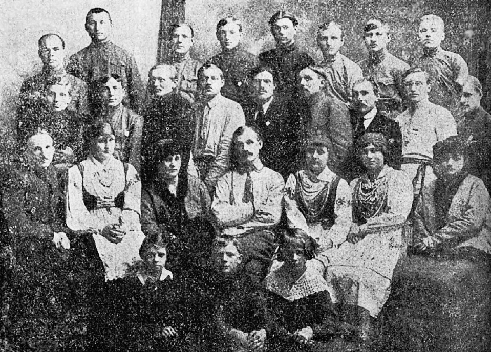 Беларуская (тарашкевіца): Сябры таварыства «Папараць-Кветка». Слуцак, 1920 г.